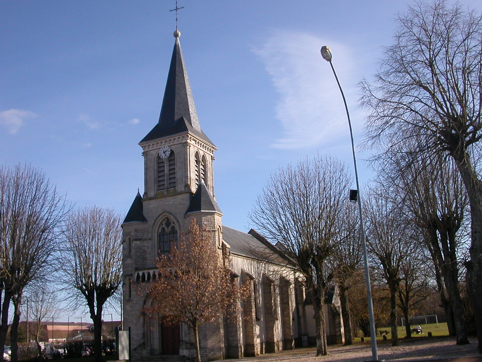 église de varois chaignot 21